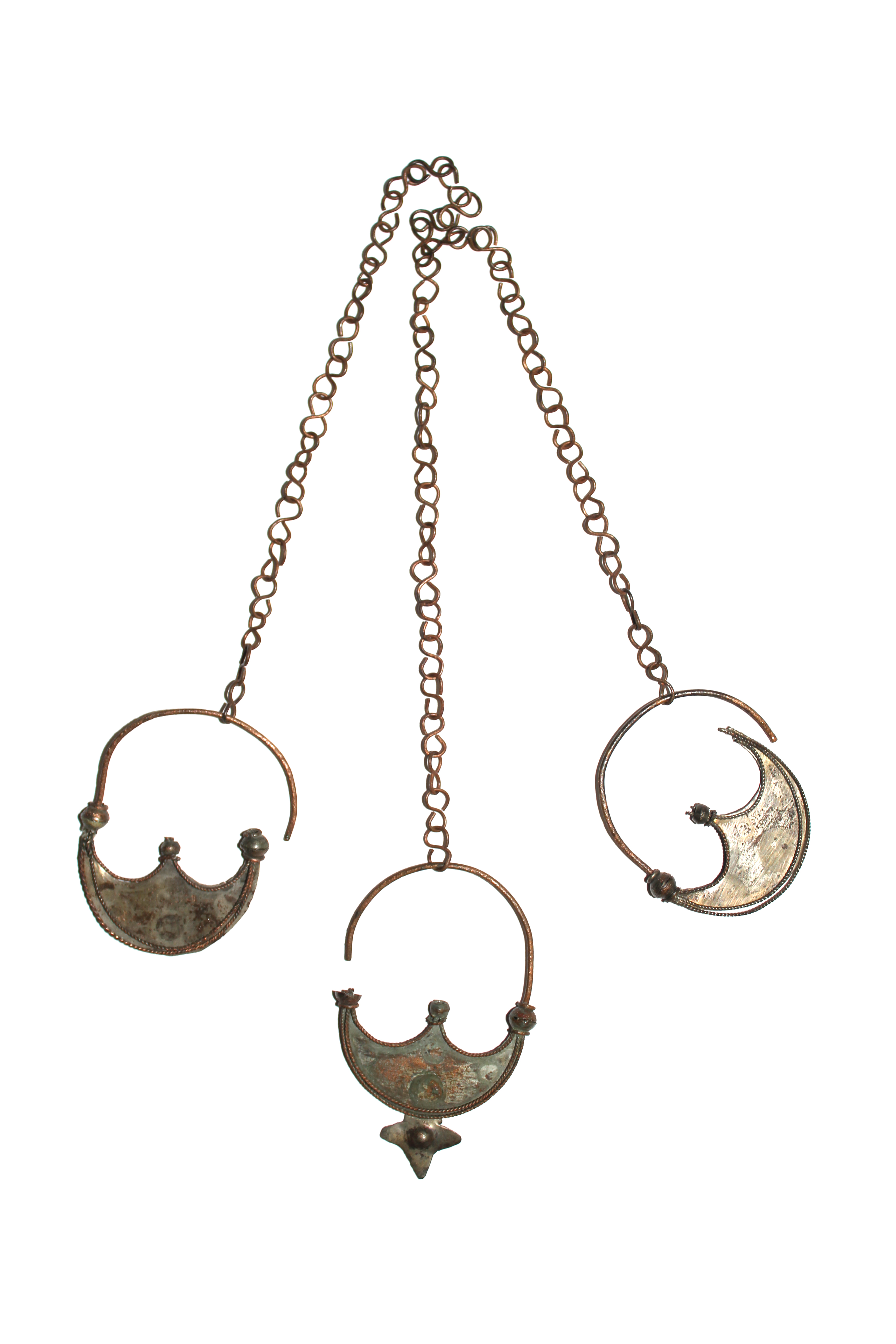 Обици луновидни, с висулки към тях.